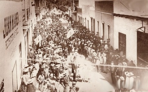 Procesion de la bandera